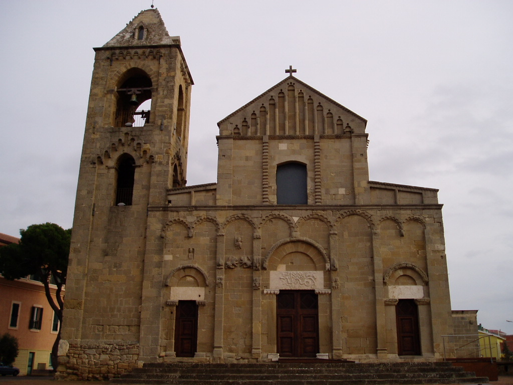 Chiesa di San Pantaleo, ex cattedrale della diocesi di Dolia (soppressa).